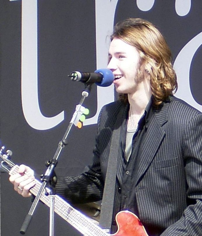 Gil Ofarim bei einem Soundcheck auf der Mercedes Bühne hinter der Mercedes Tribüne am Hockenheimring bei einem DTM Rennen